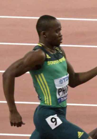 DOH60147 400m men semifinal sacoor